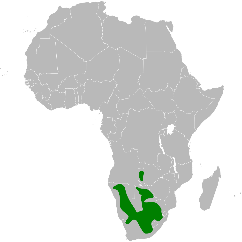 Spizocorys conirostris distribution map; using BlankMap-Africa.svg, based on